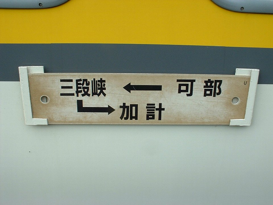 可部線気動車の行先票（現在廃止区間）